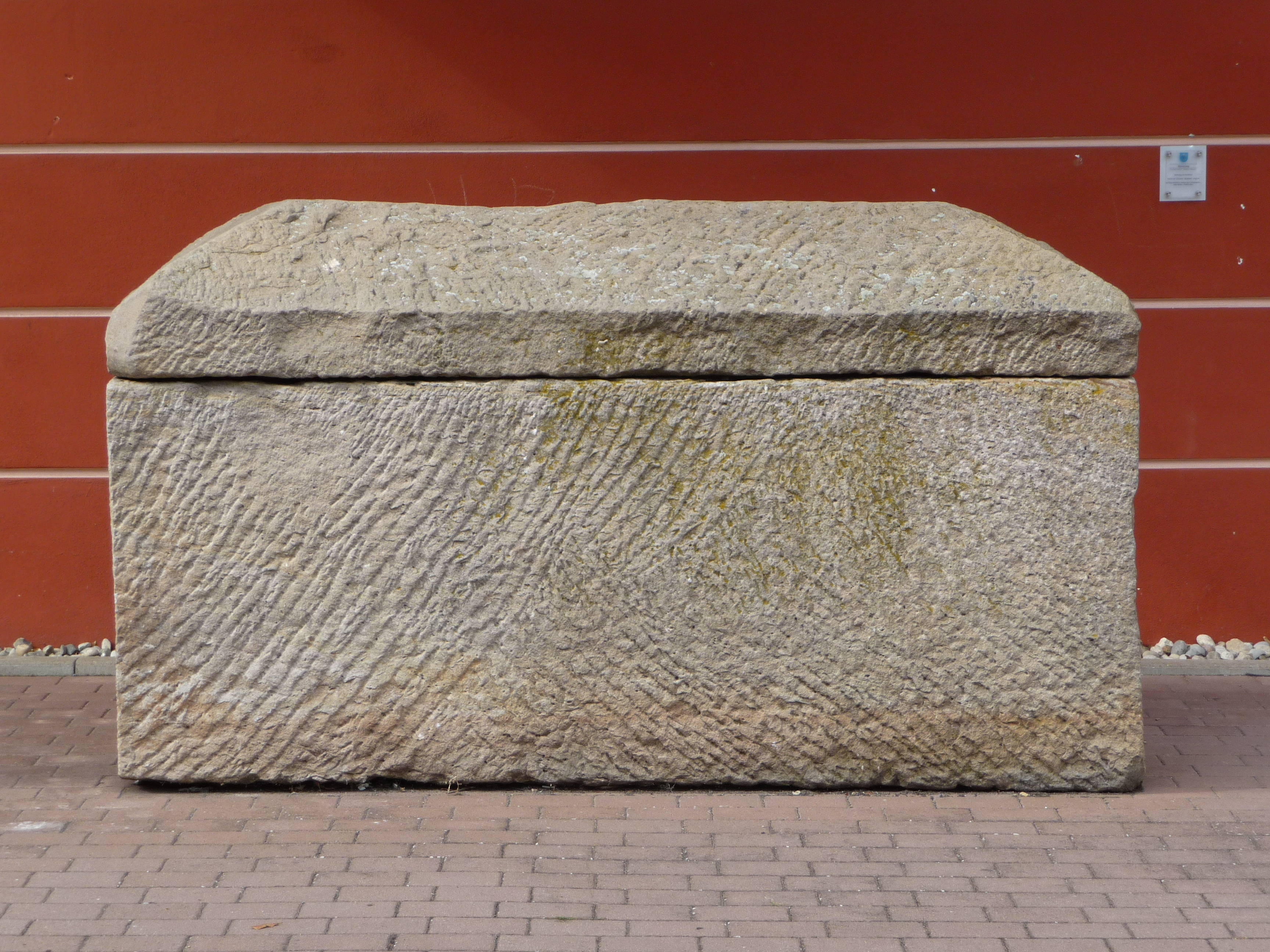 römischer Sarg in Göllheim